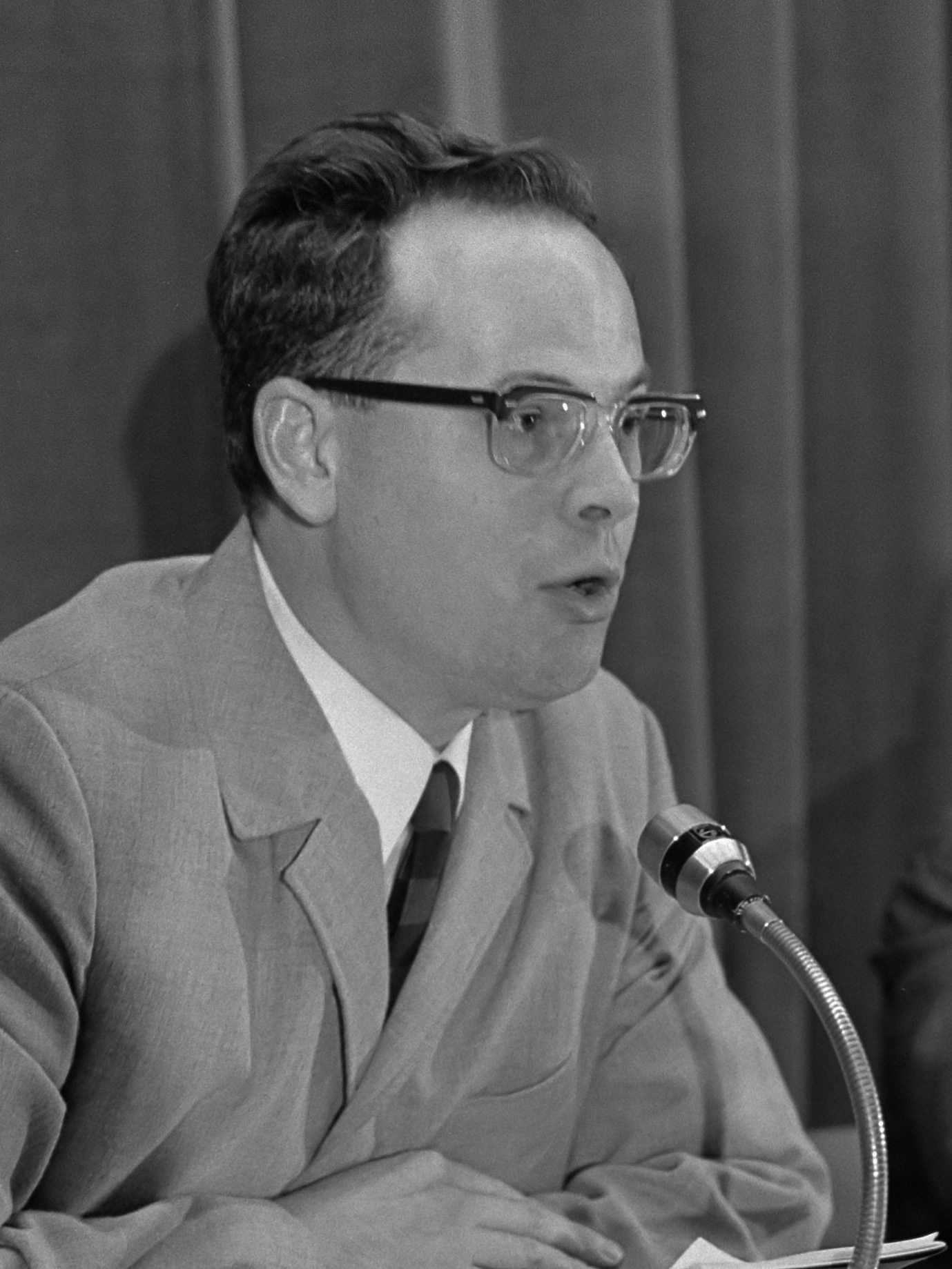 In het Van Nispenhuis te Amsterdam wordt het congres "Kerk in de Maatschappij" gehouden, congres van internationale groepen van solidaire priesters en leken. Michael Raske aan het woord 28 september 1970